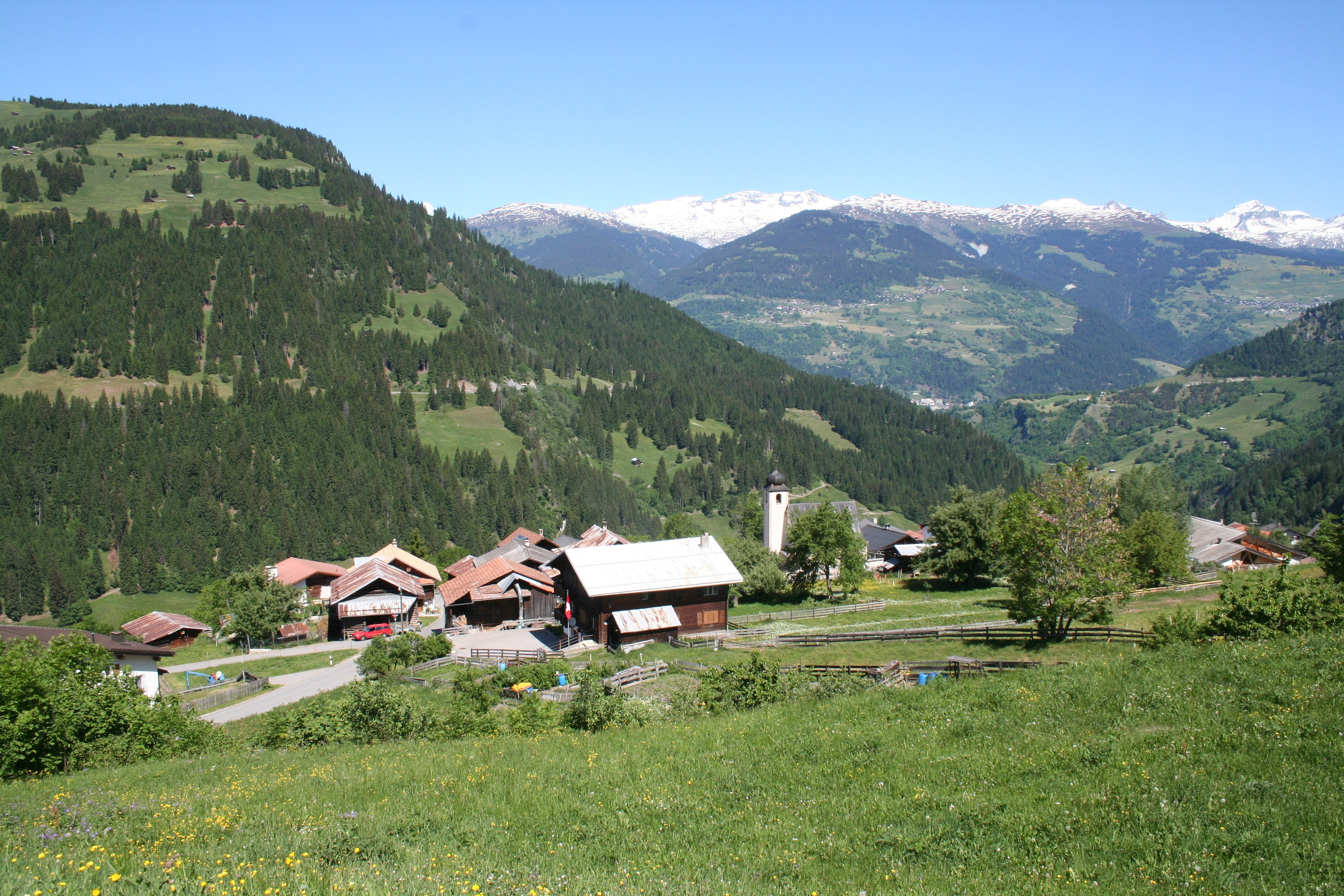 Pitasch